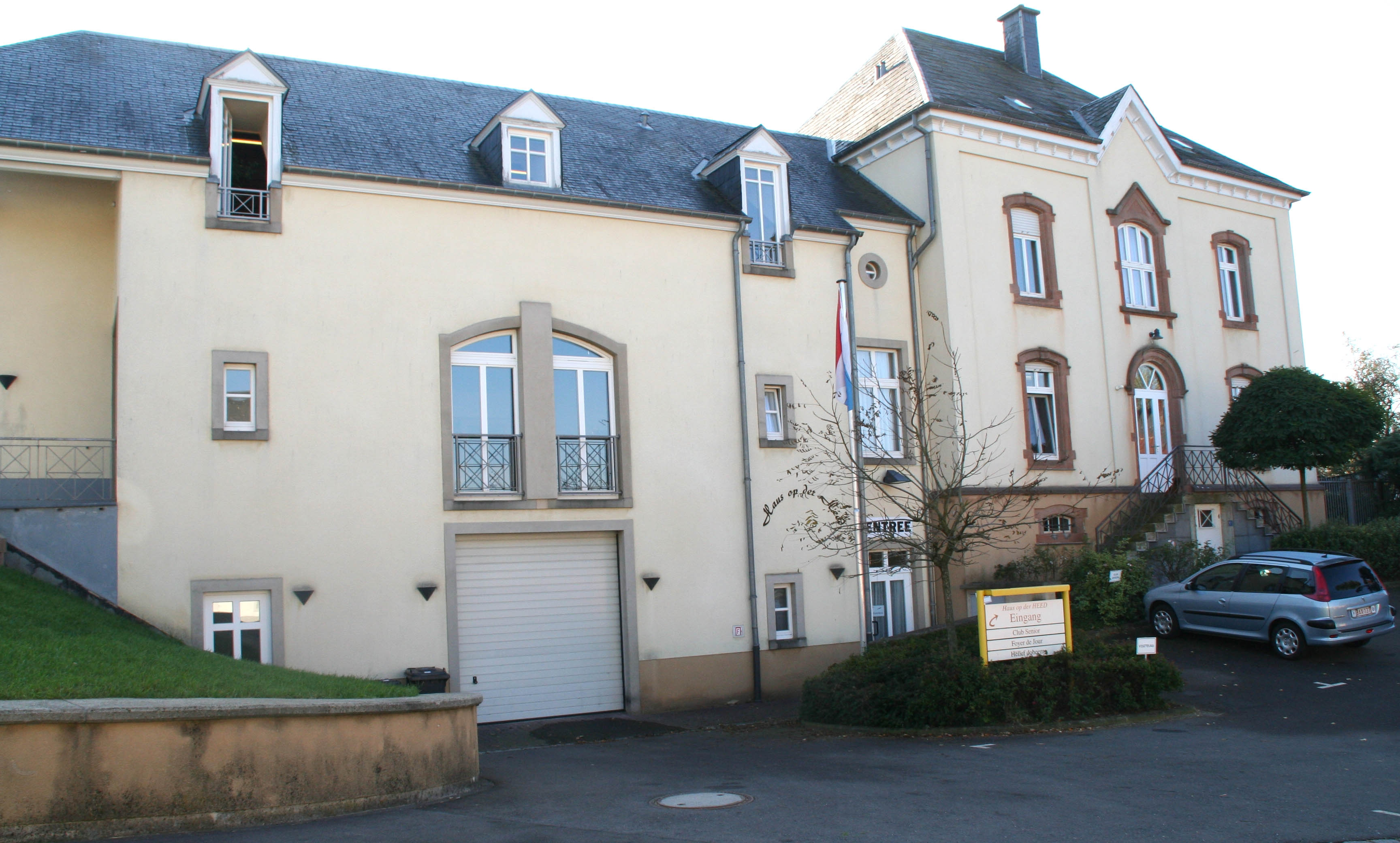 Haus op der Heed zu Hëpperdang. Gemeng Hengescht